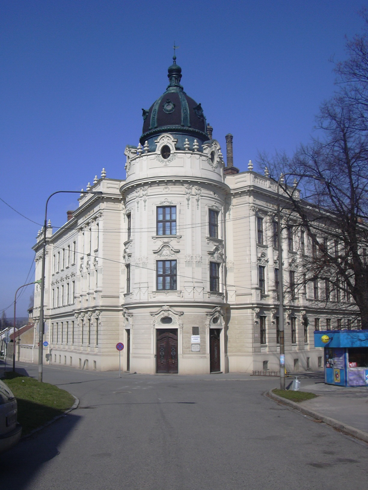 Gymnázium (Vyškov- czech republic)